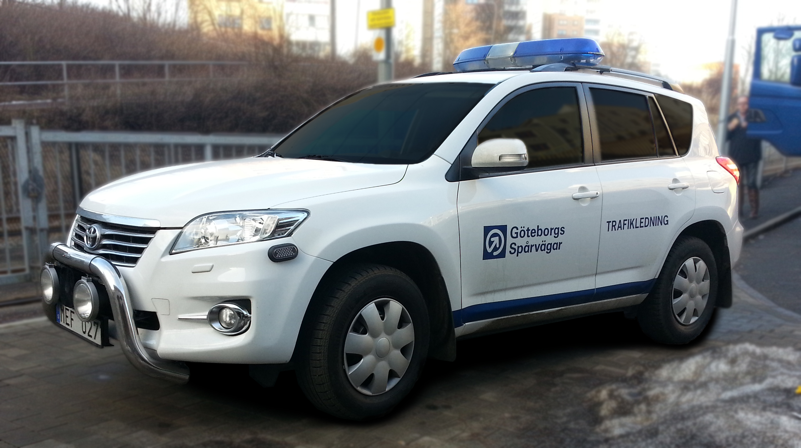 Bil tillhörande Göteborgs Spårvägar.